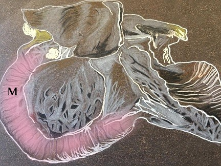 Hipertrofik kardiyomyopati